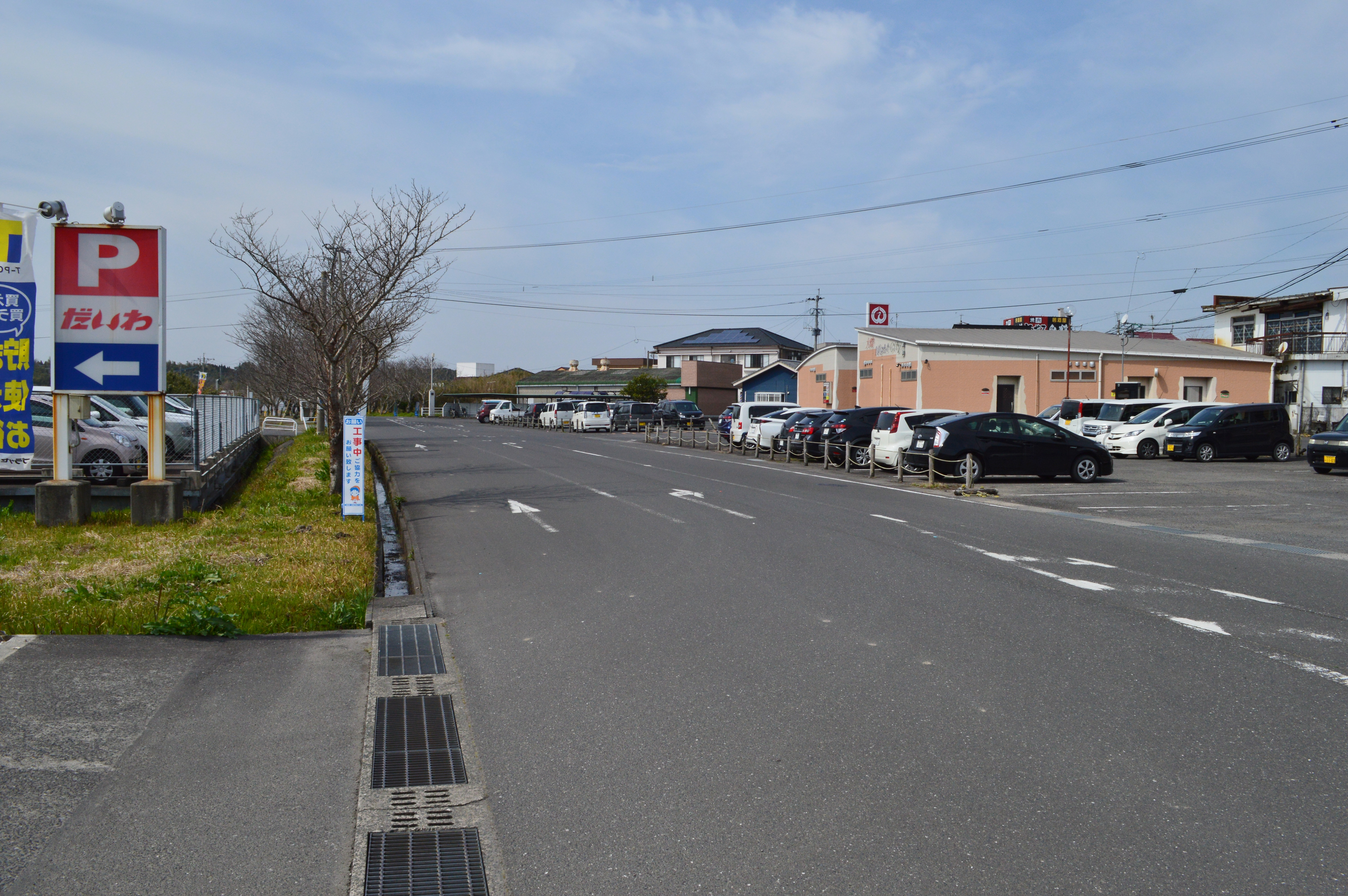 三文字駅跡